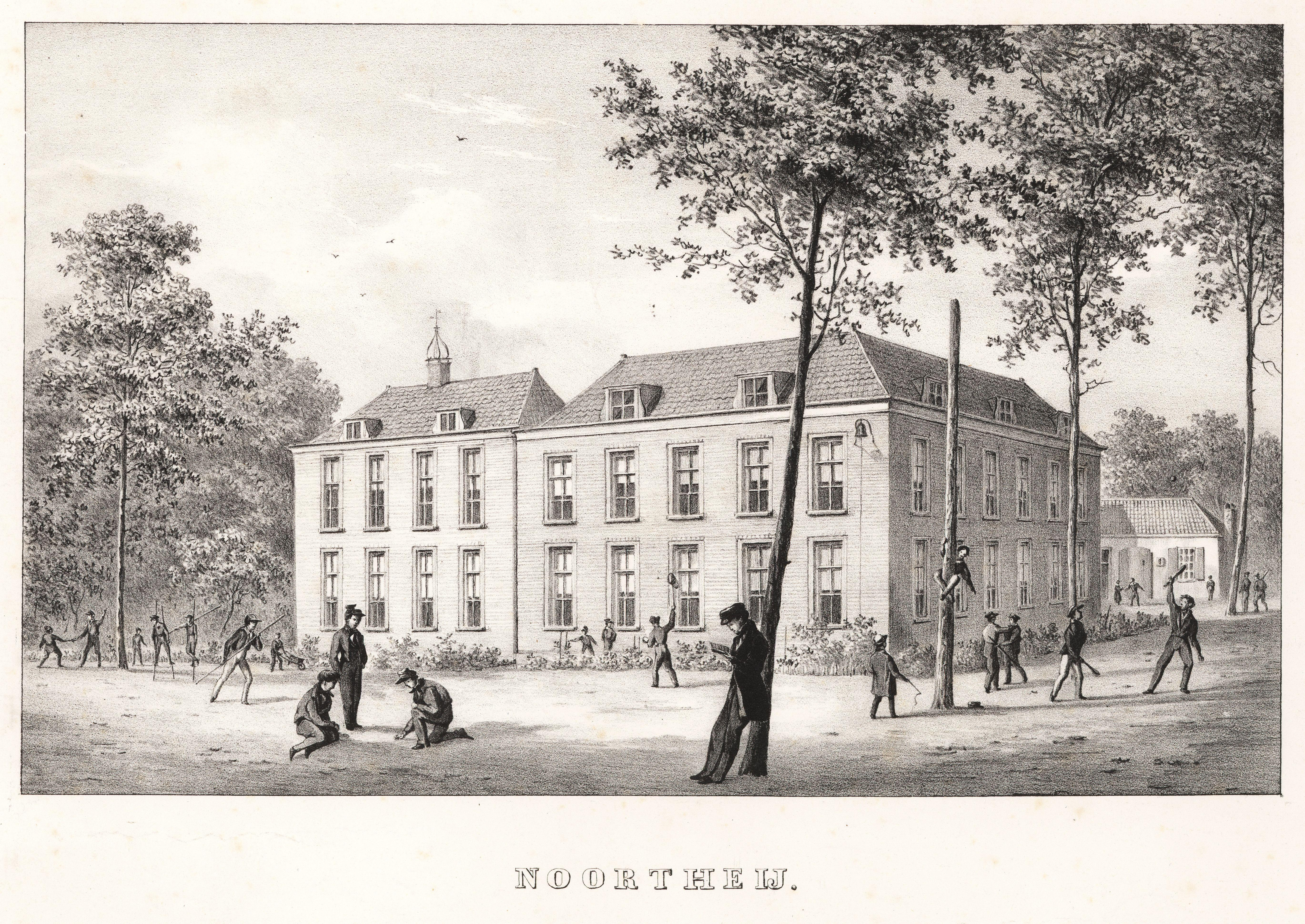 Noortheij, gebouw en speelplaats met leerlingen, gezien uit het zuiden. Uit: P. de Raadt, Noortheij huis van opvoeding en onderwijs. Jongens knikkeren, lopen stelt, klimmen in een paal, lezen en spelen cricket.